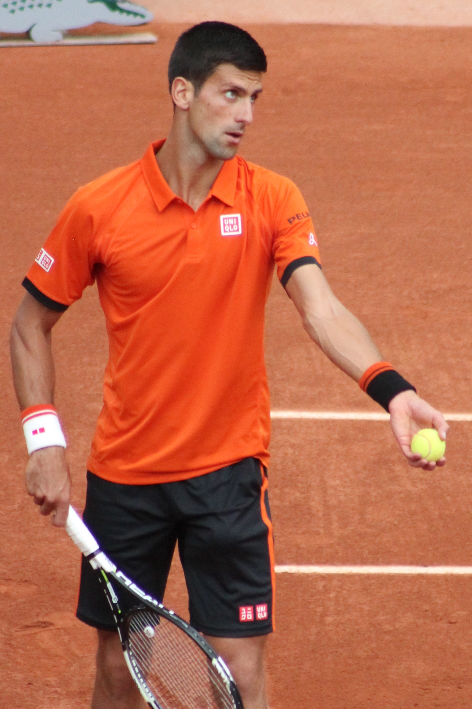 Djokovic RG15 (1)